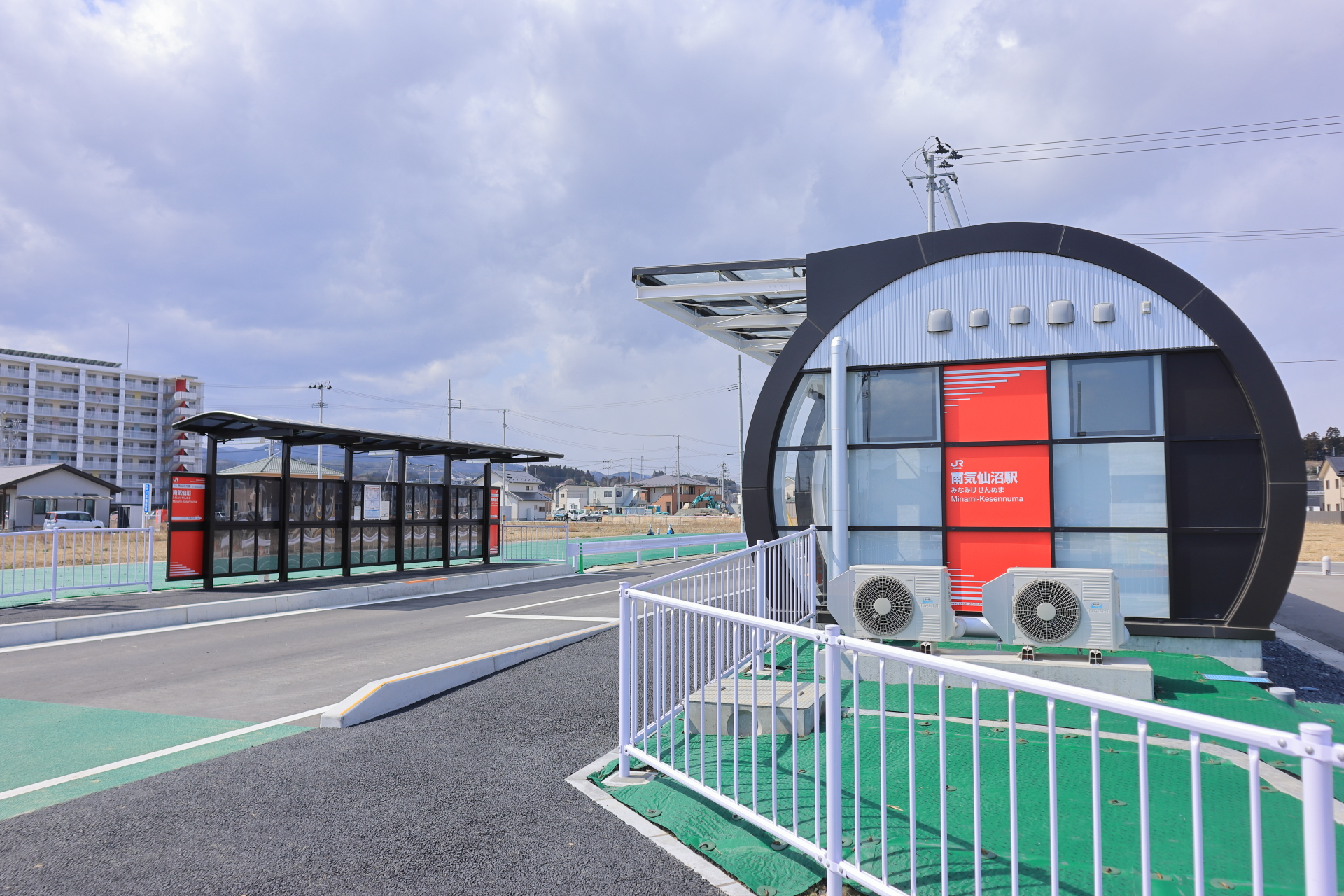 2020年3月14日に供用されたJR気仙沼線BRTの南気仙沼駅。右側が柳津方面行き、左側が気仙沼方面行き。一時期消滅していた、独特の円筒形駅舎が復活した。